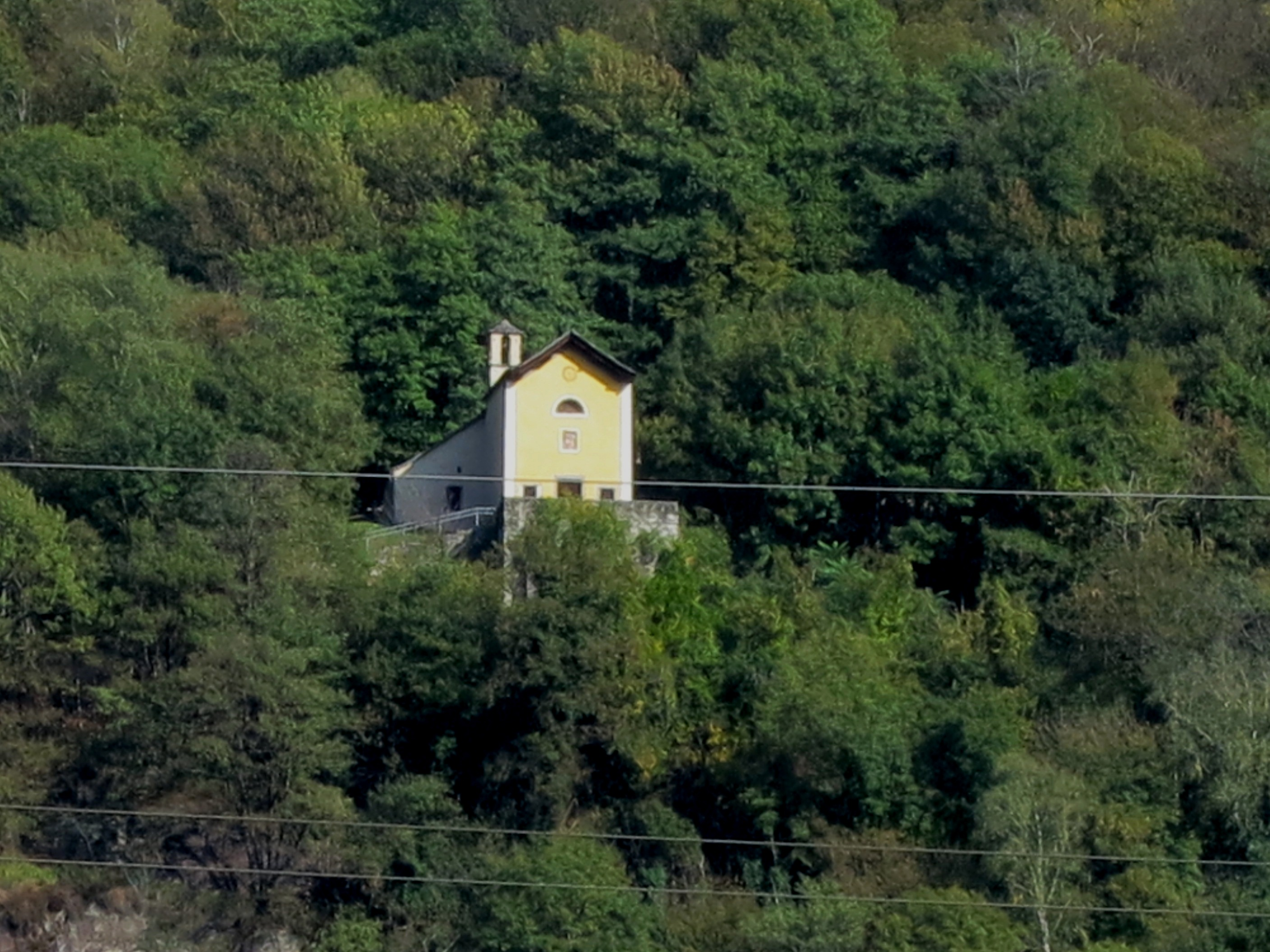 Kirche Santa Pietà, Osogna TI, Schweiz